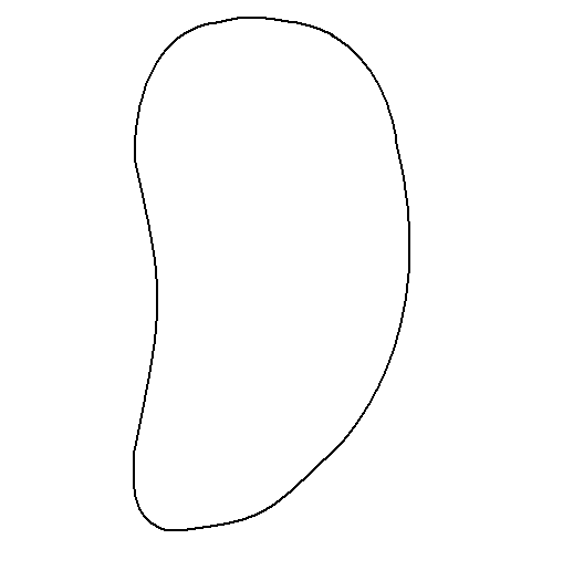 Colorado potato beetle